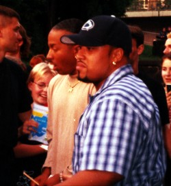 Das Duo Down Low am 16. Juli 1999 kurz vor einem Konzert in Dresden.